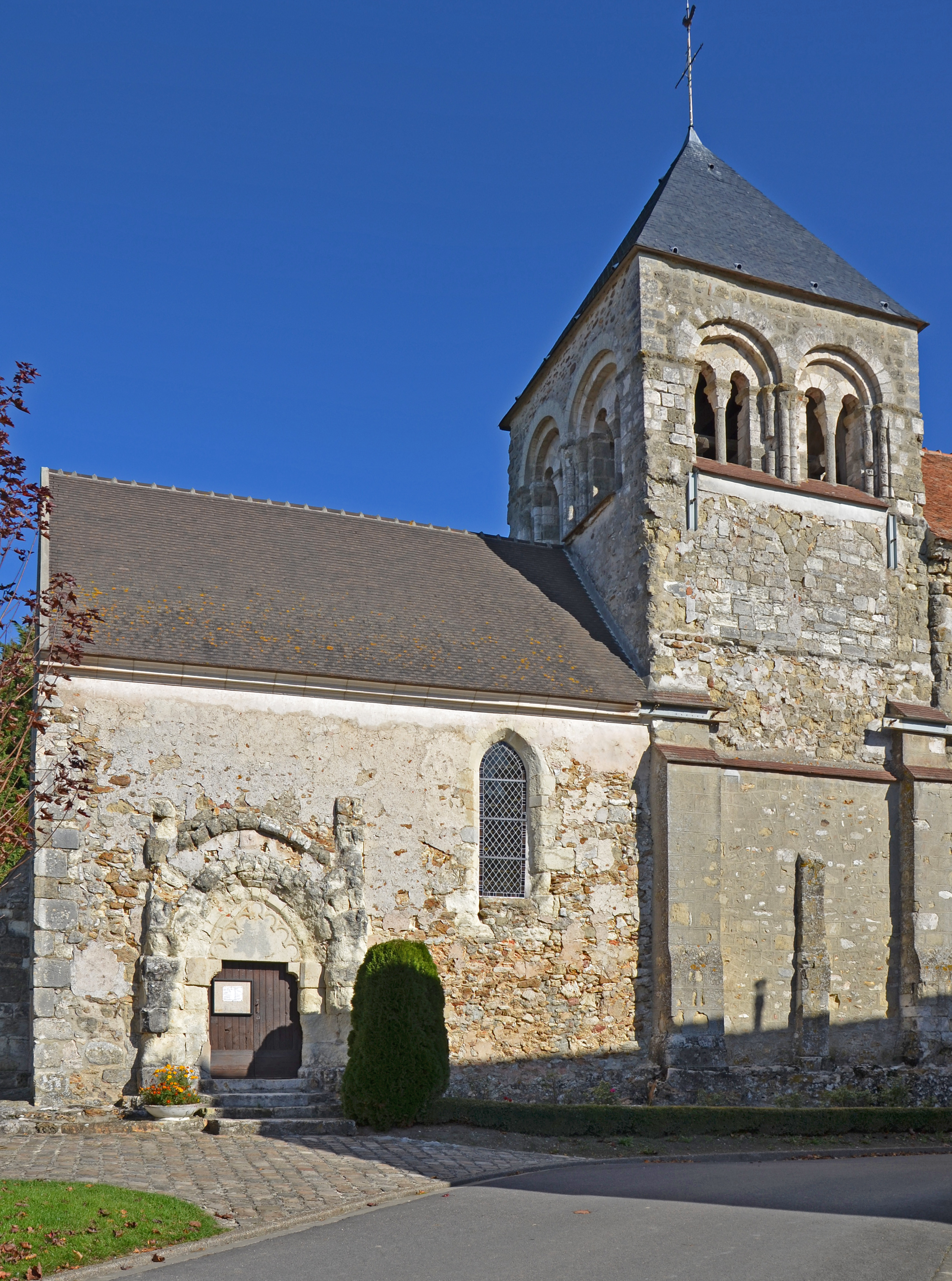 Eglise de Celle-lès-Condé, Aisne, Picardie, France